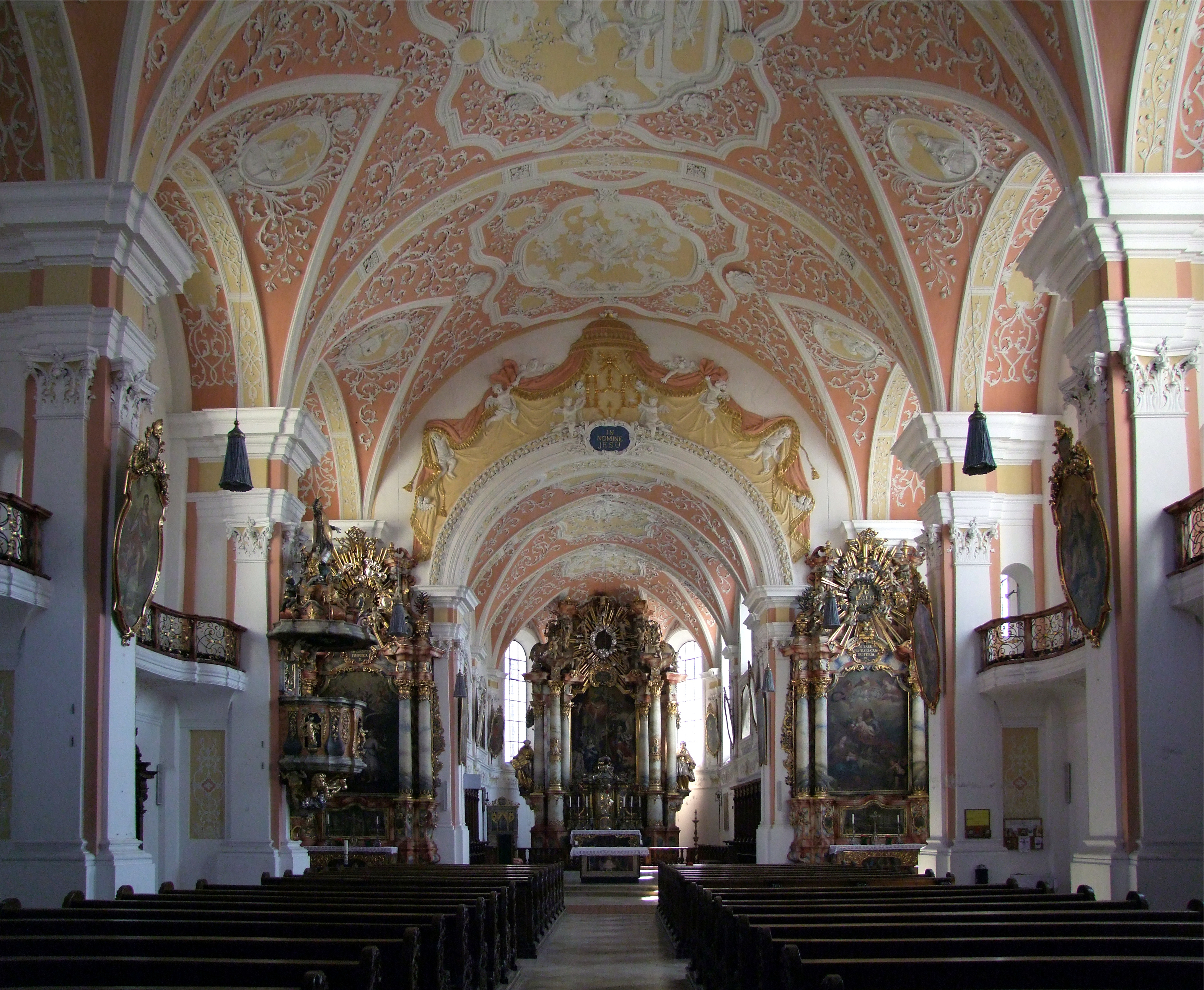 Mariä Verkündigung im oberschwäbischen Mindelheim. Ehemalige Augustiner, dann Jesuitenklosterkirche.